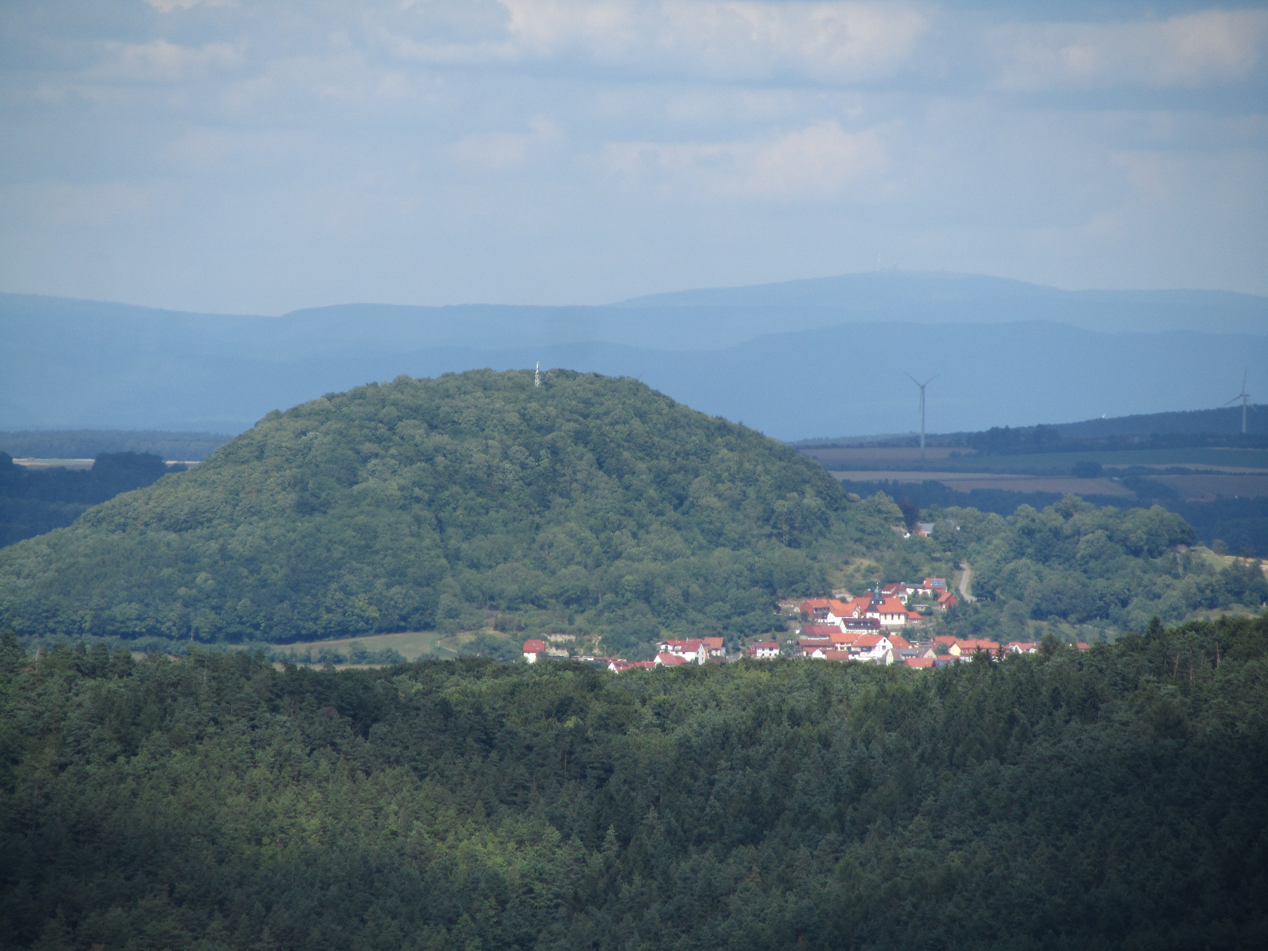 Blick vom Turm der Burg Hanstein nach Nordwesten zu Rusteberg, Marth und Brocken